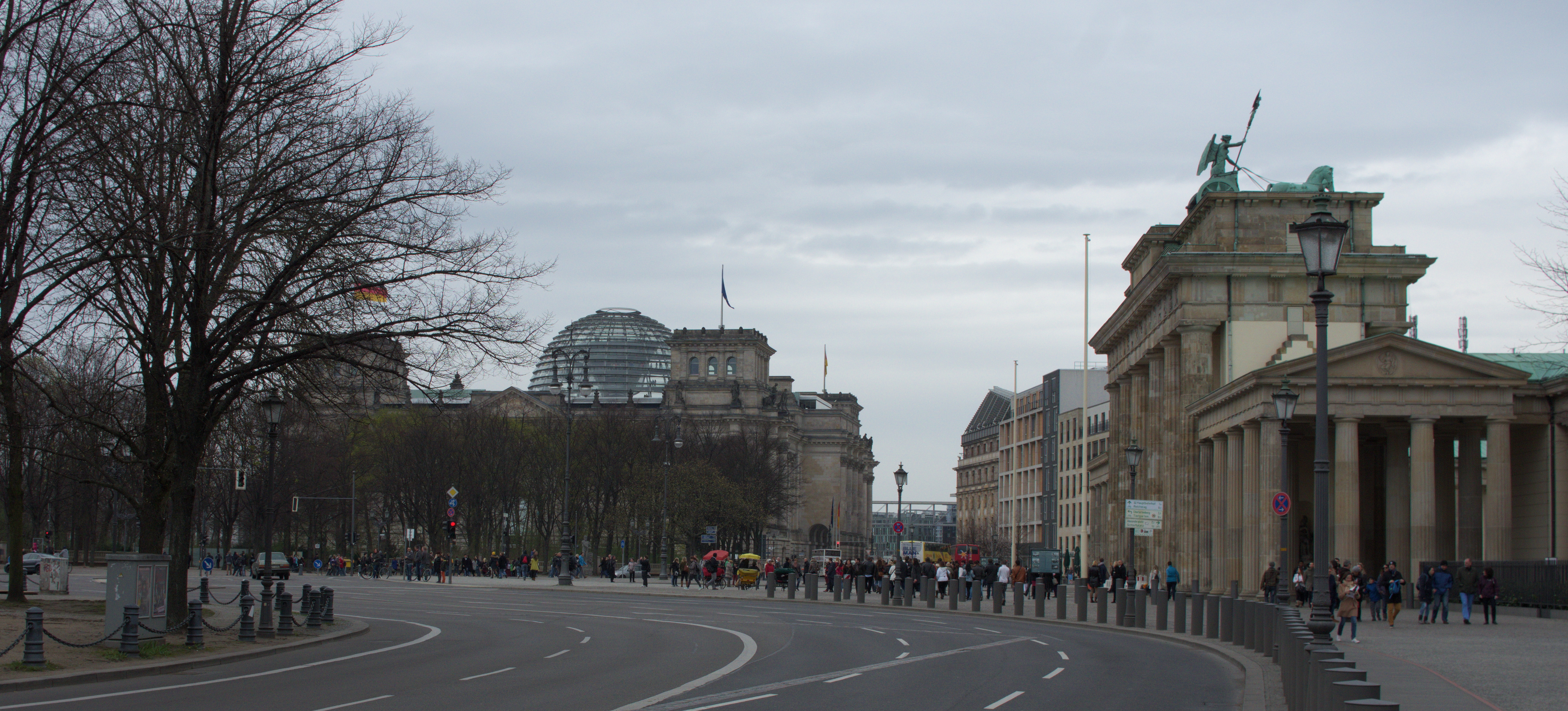 Berlin, Reichstagsgebäude und Brandenburger Tor